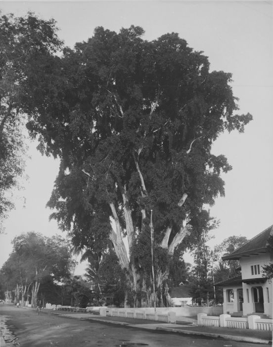 foto. Waringin naast Hotel Van Rheeden